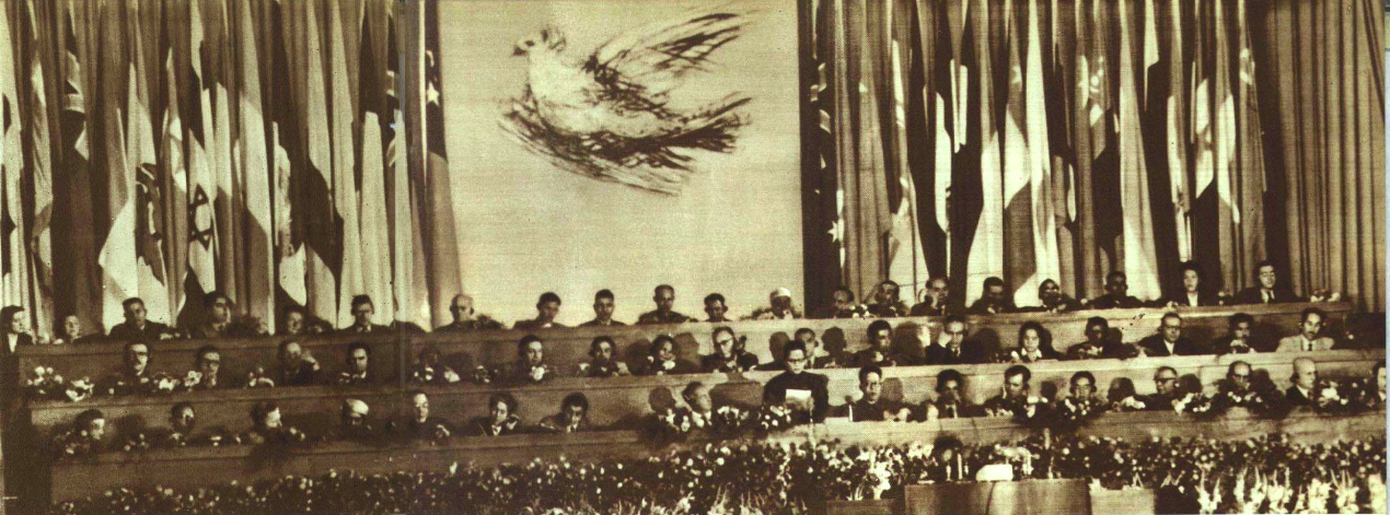 1952年10月2日亚洲太平洋区域和平会议